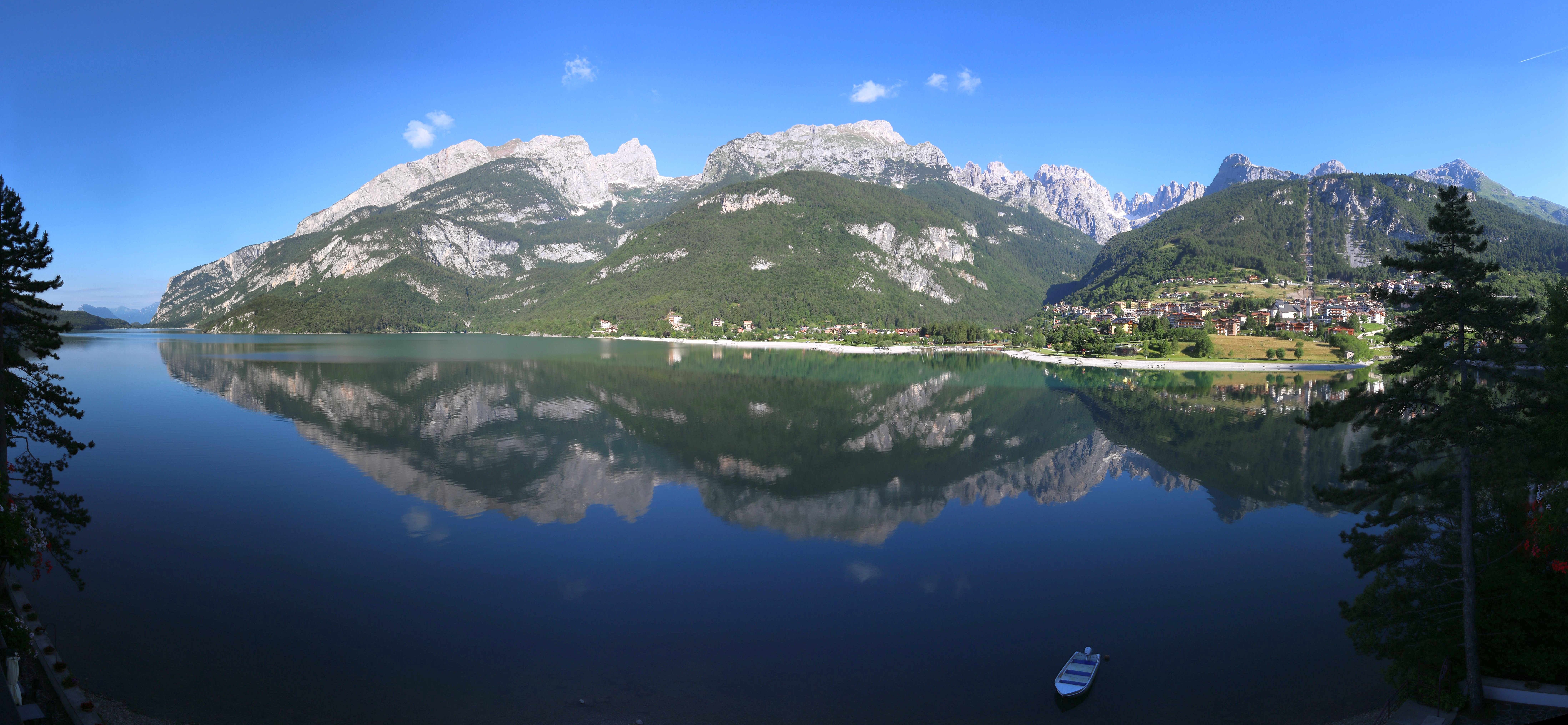 Molveno und Lago di Molveno vor der Brentagruppe. Aufnahmestandort: Lago Park Hotel